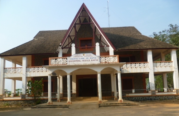 Bâtisse de la Préfecture de Bafia, sa construction s'est achevée en 1920.